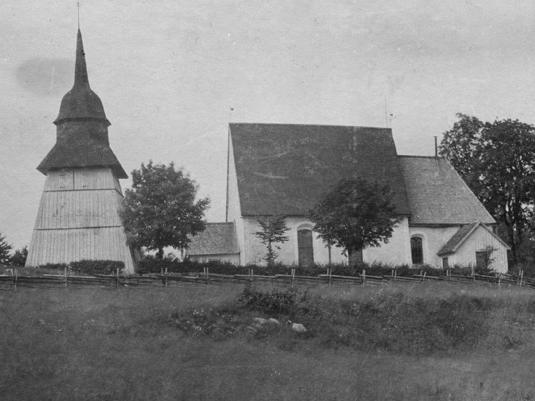 Våthults kyrka